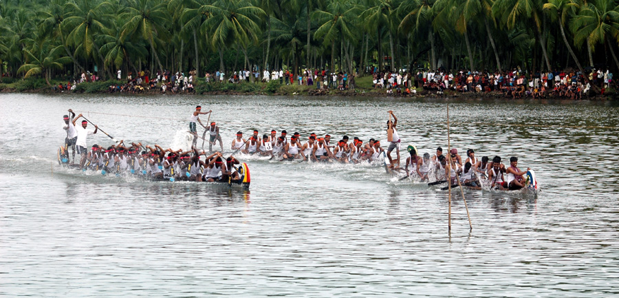 പൊന്നാനി ബിയ്യം കായലിൽ ഓണാഘോഷത്തോടനുബന്ധിച്ച് നടന്ന വള്ളംകളി